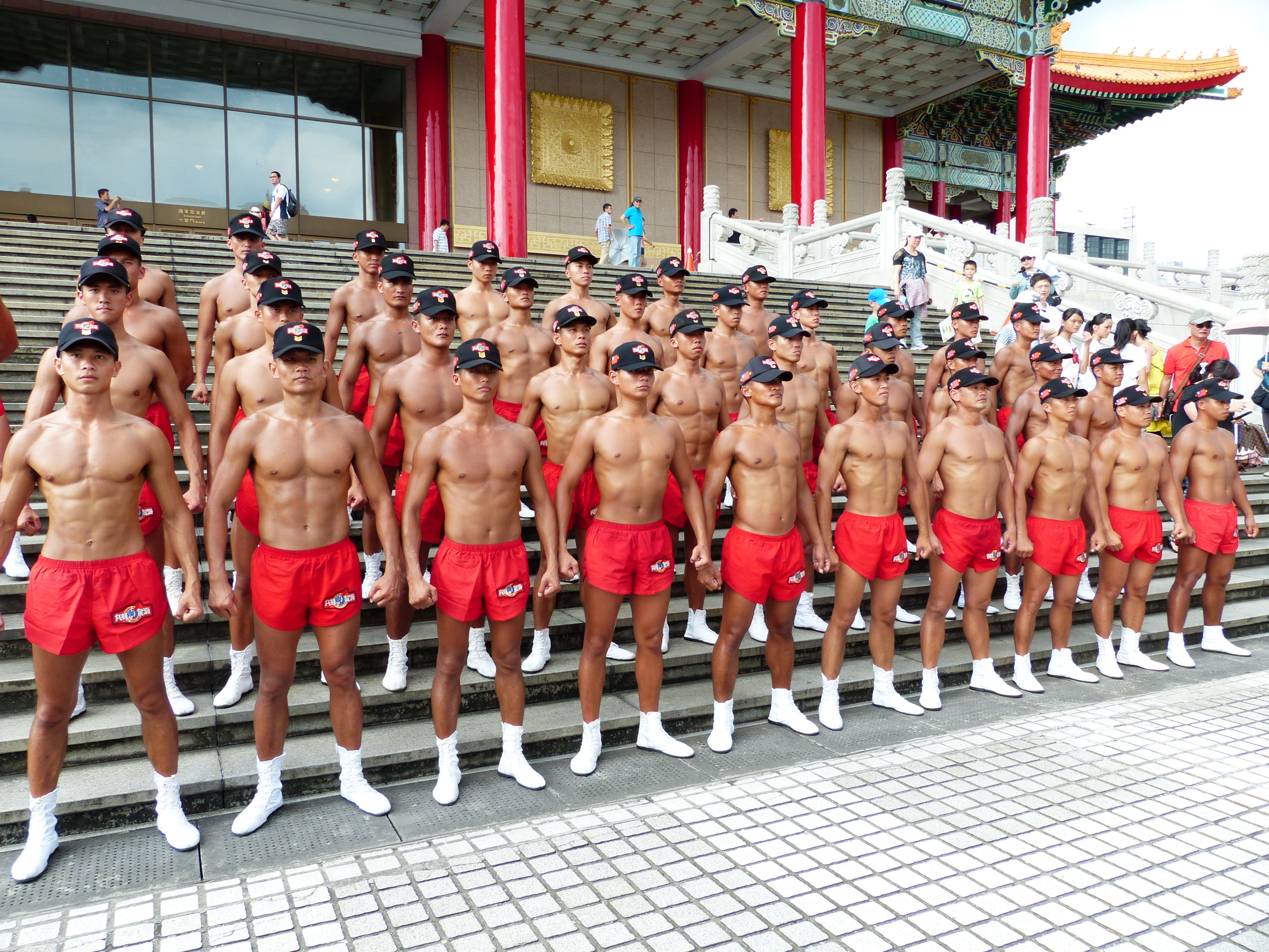 陸軍兩棲偵察營蛙兵操練結束，整隊站立於國家音樂廳階梯，接受攝影。